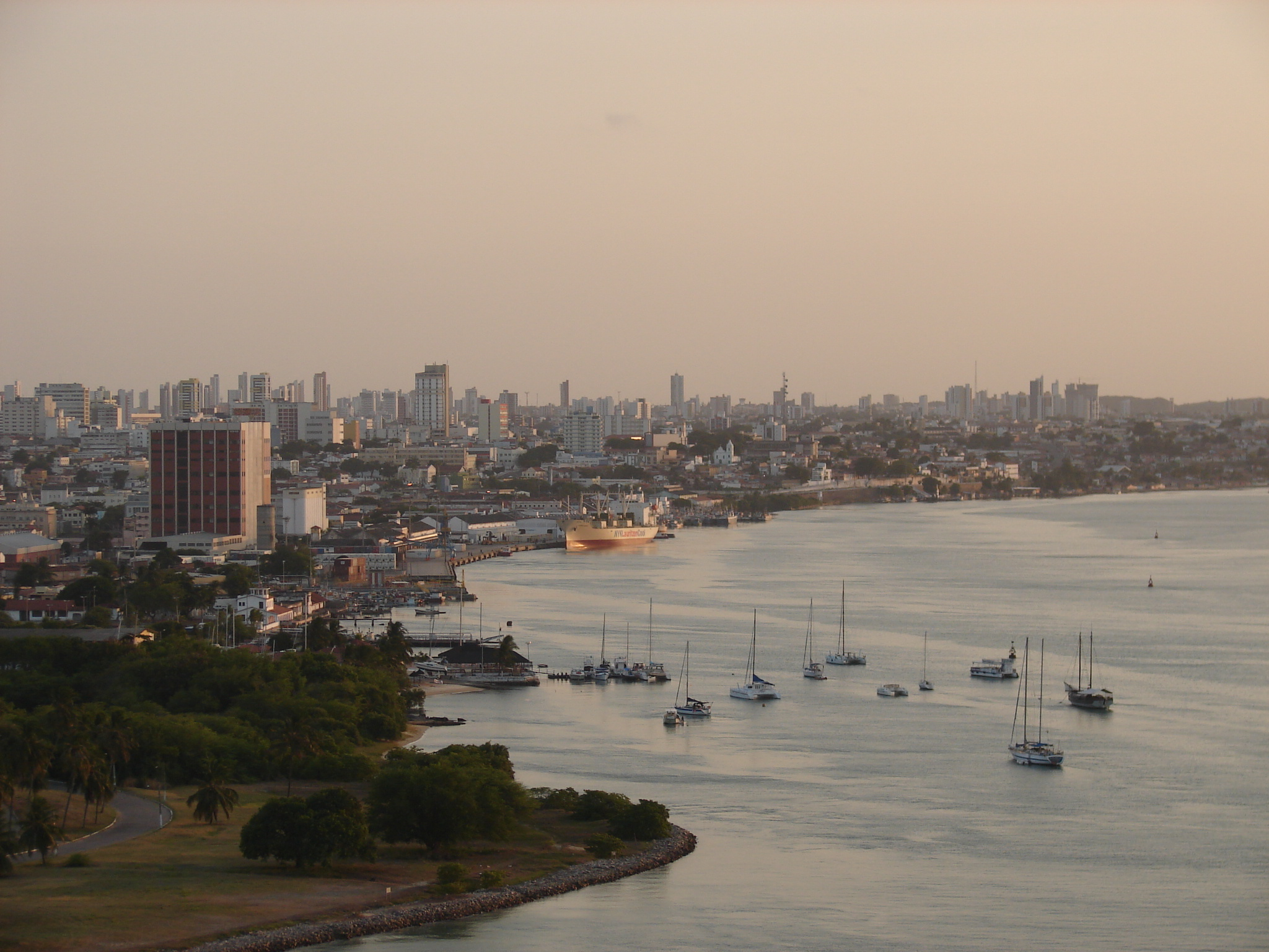 Vista do Rio Potengi com o Porto de Natal em Natal-RN/Brasil.